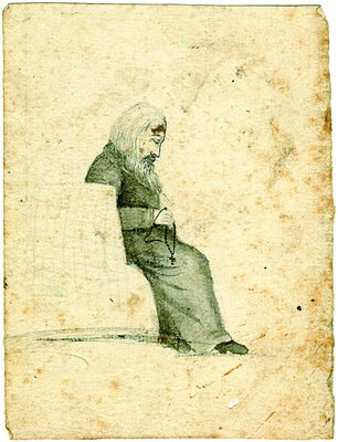 Прп. Зосима (Верховский). Рисунок. Кон. 20-х - нач. 30-х гг. XIX в. (архив Зосимовой пуст.)